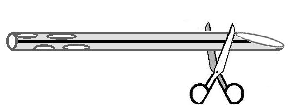 O dreno torácico deve ser preparado para conexão cortando-o transversalmente na sua extremidade chanfrada distal.